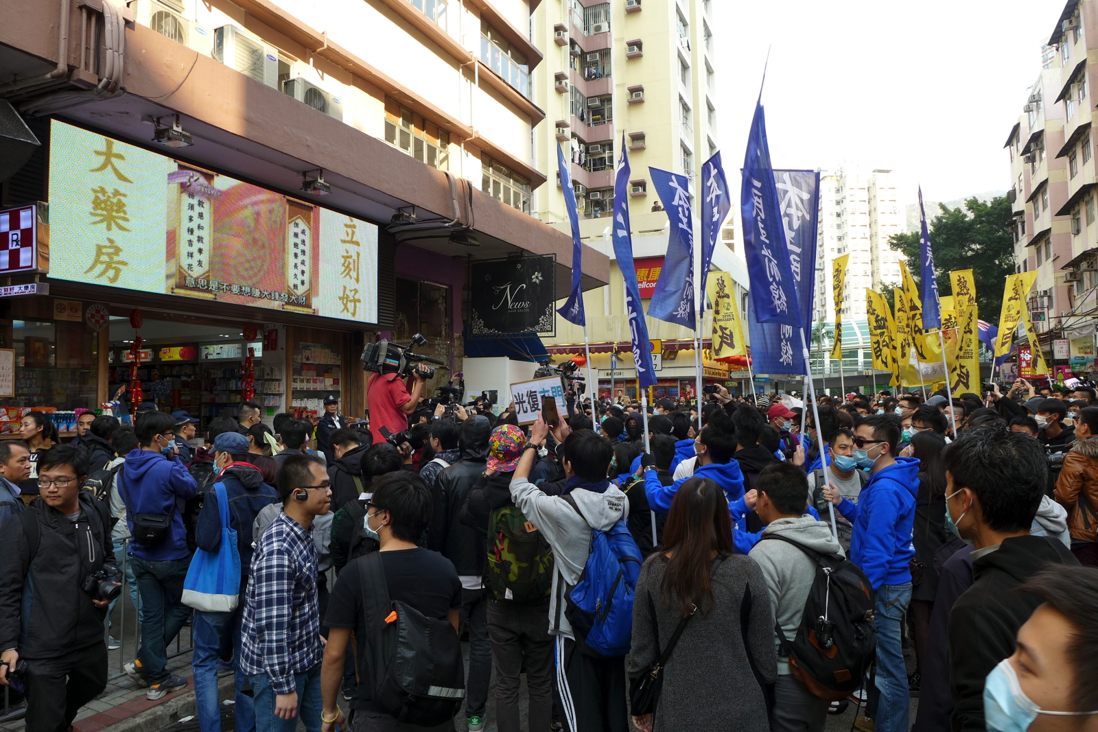 San Hui Protesters